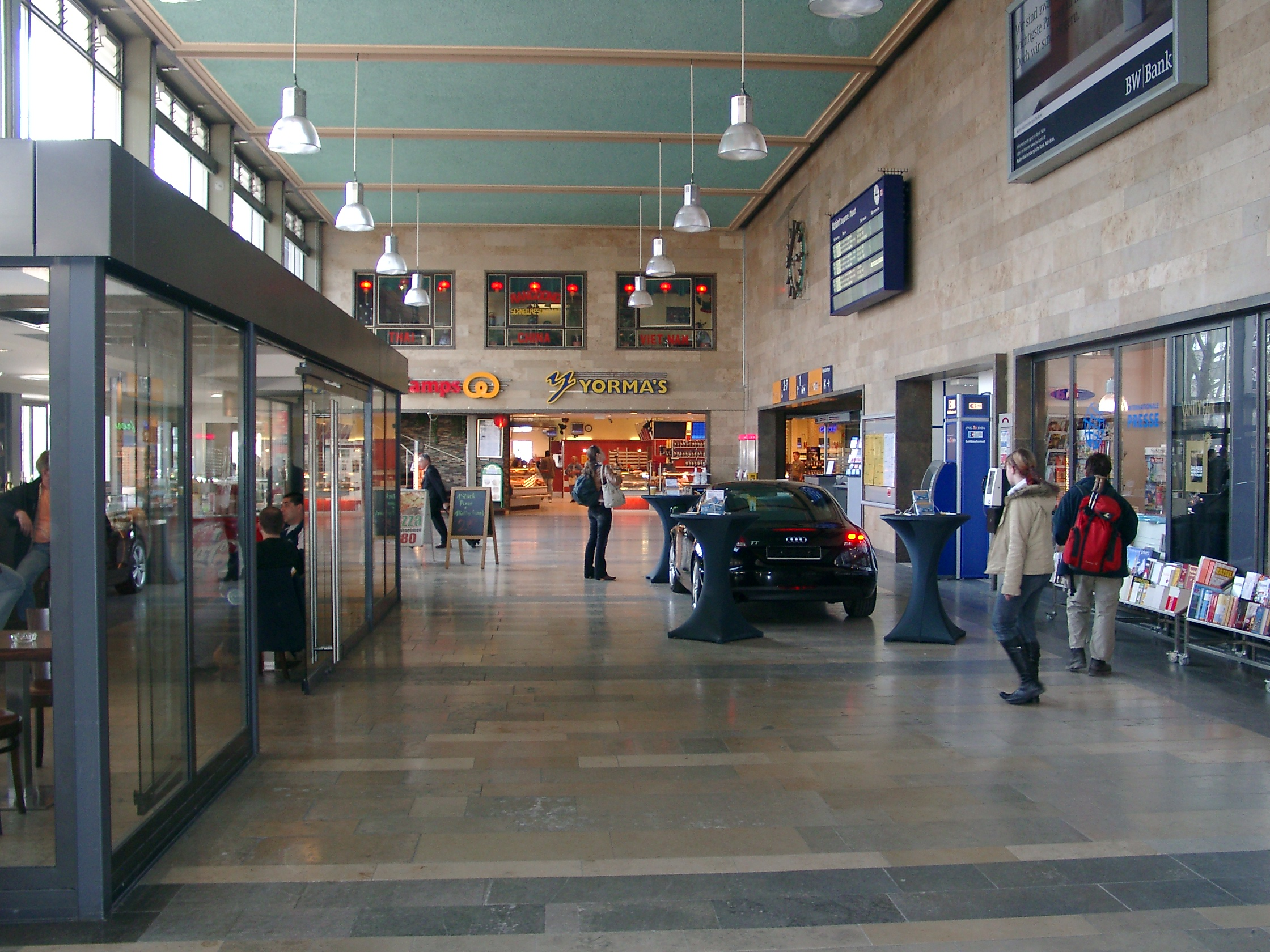 Heilbronn, Innenhalle des Hauptbahnhofs